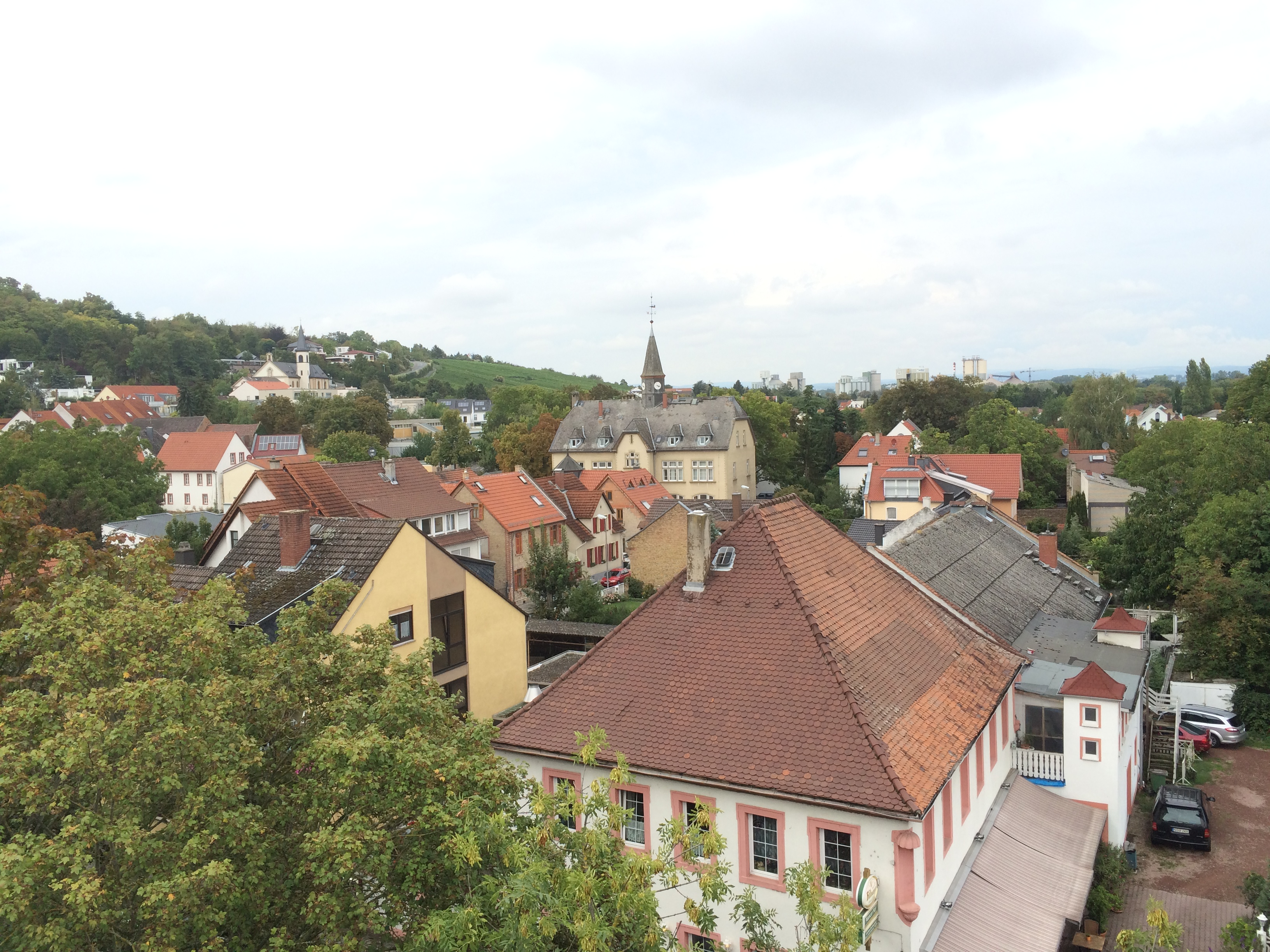 Mainz-Laubenheim, im Vordergrund das historische Gasthaus “Mainzer Hof”, im Hintergrund das Zementwerk Weisenau. Sicht auf Laubenheim in Richtung Norden aus Fahrgeschäft. Links oben katholische Kirche „Mariä Heimsuchung“, mittig das alte Schulhaus.